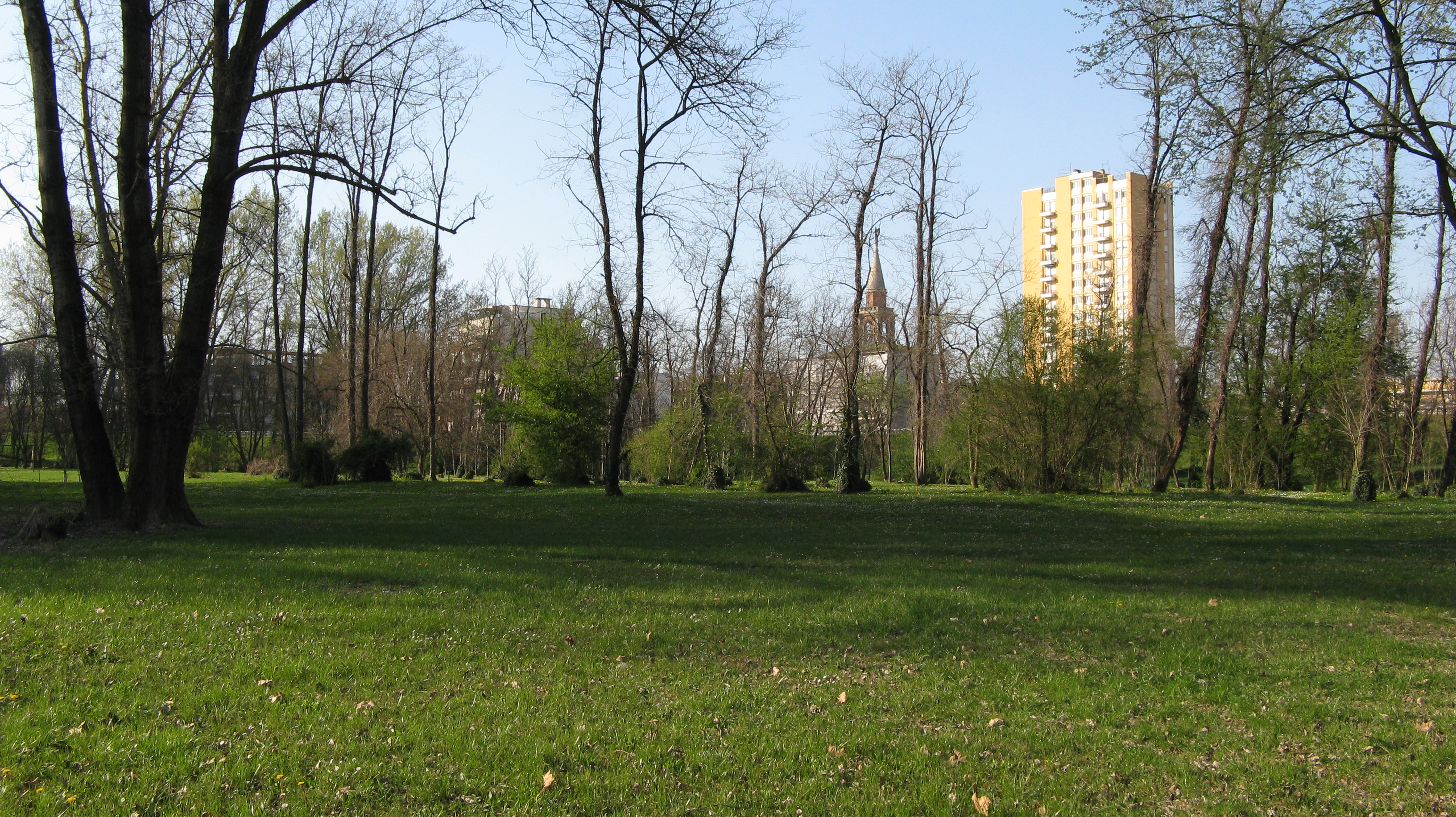 Parco Fluviale di San Donà di Piave